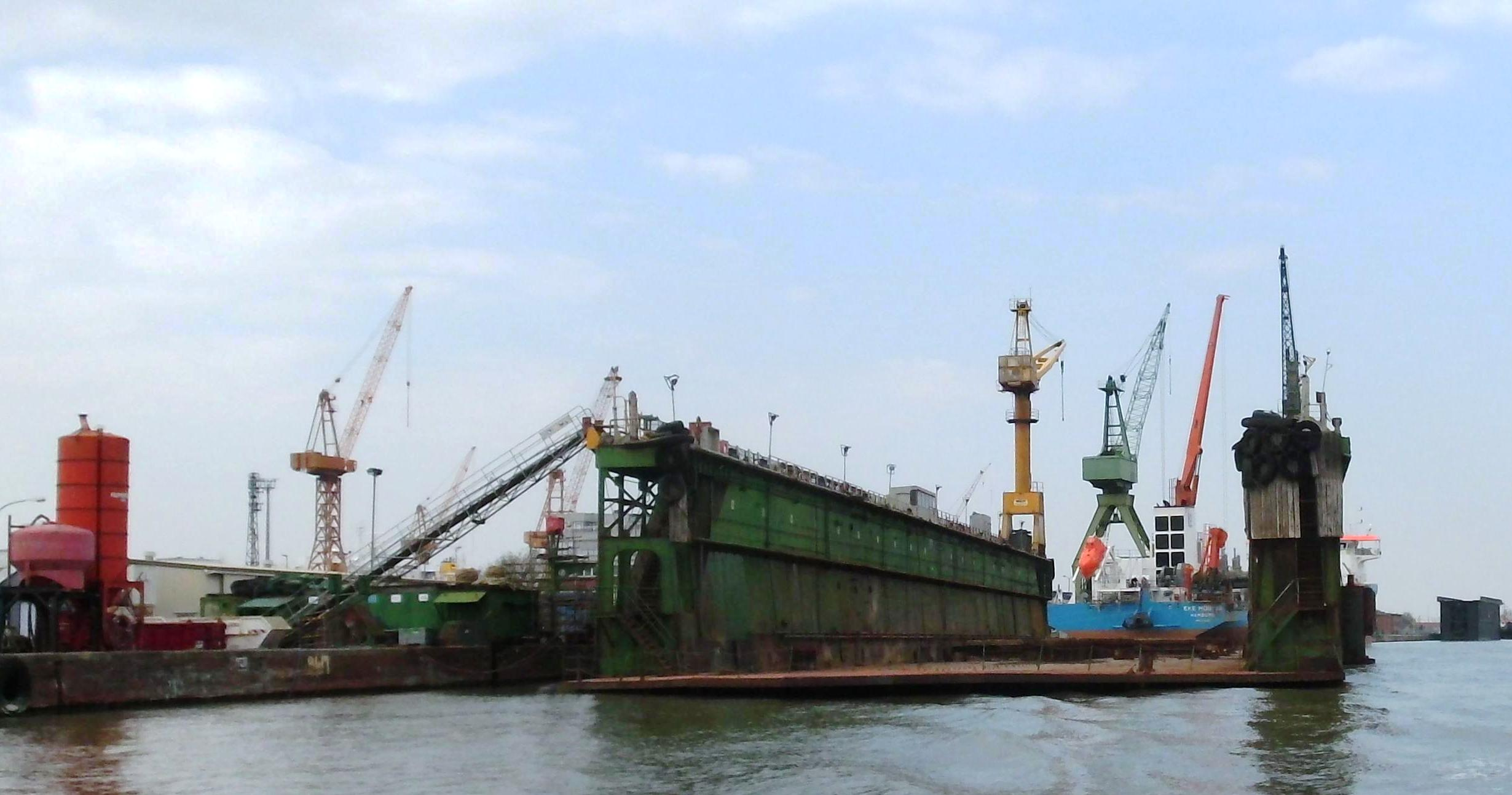 Dock IV